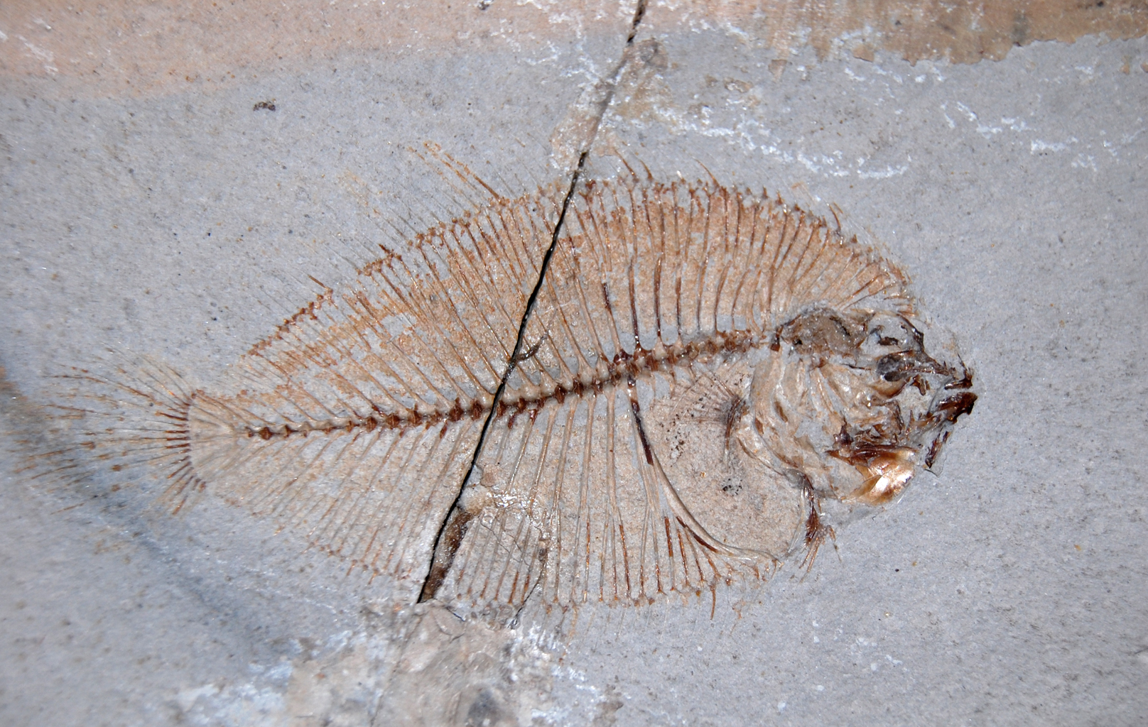 Naturhistorisches Museum Wien